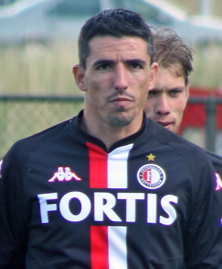 Roy Makaay (Feyenoord)